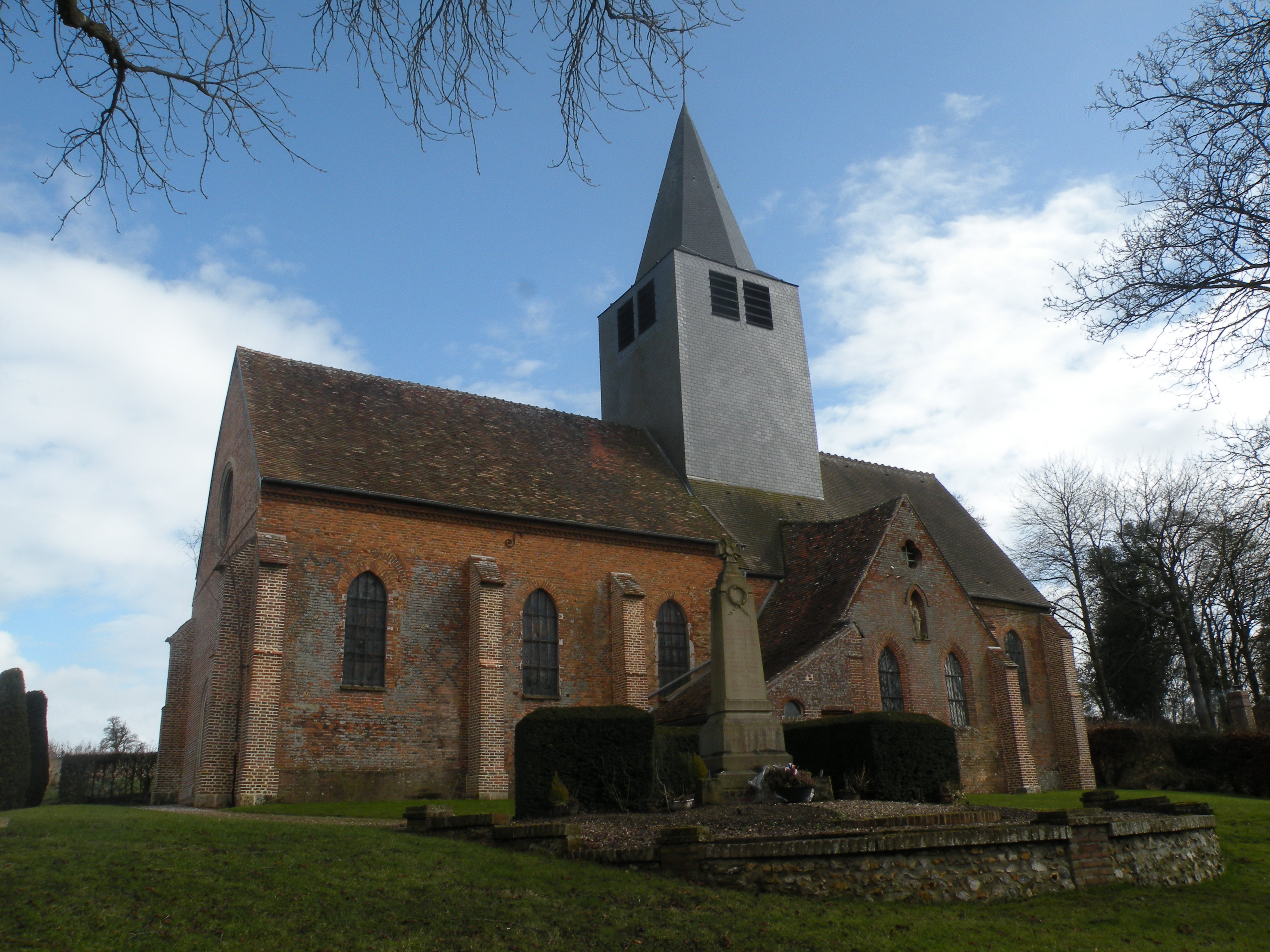 Le Vauroux